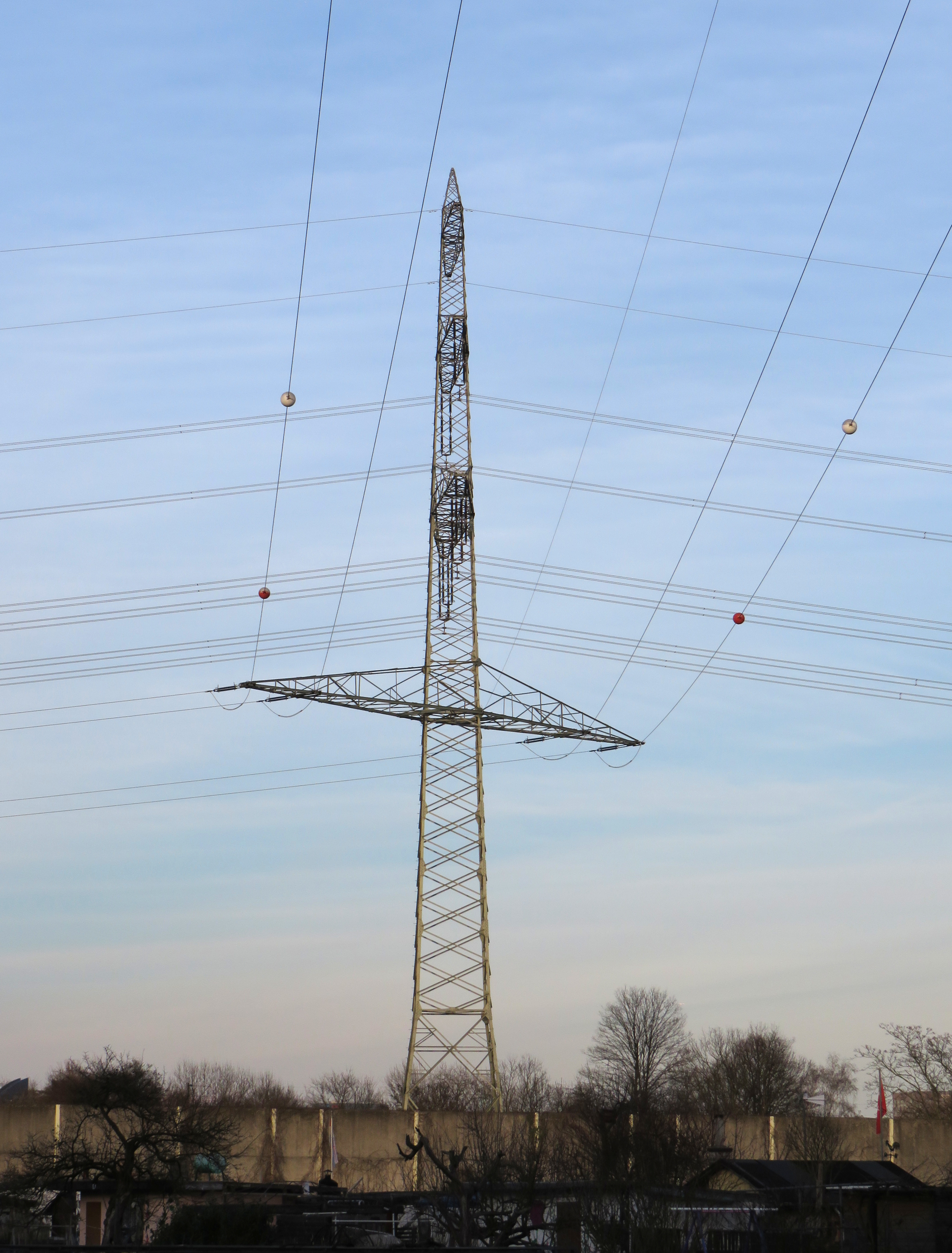 Abzweigmast der 380-kV-Leitung LH-11-3011 (Karben–Frankfurt Südwest) der TenneT TSO (ehem. PreußenElektra) mit der Bahnstromleitung 554 (Frankfurt–Rödelheim) in Frankfurt.